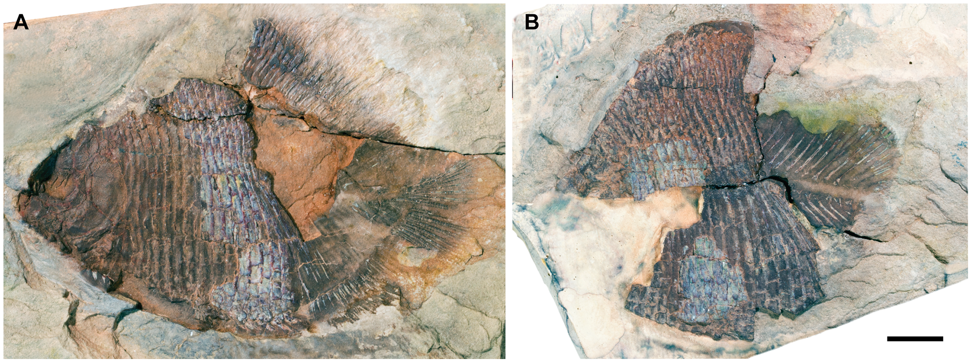 †Hemicalypterus weiri holotype specimen, USNM V 23427. Part and counterpart each in left lateral view. (A) USNM V 23427A. (B) USNM V 23427B (image reversed). Scale bar equals 1 cm.